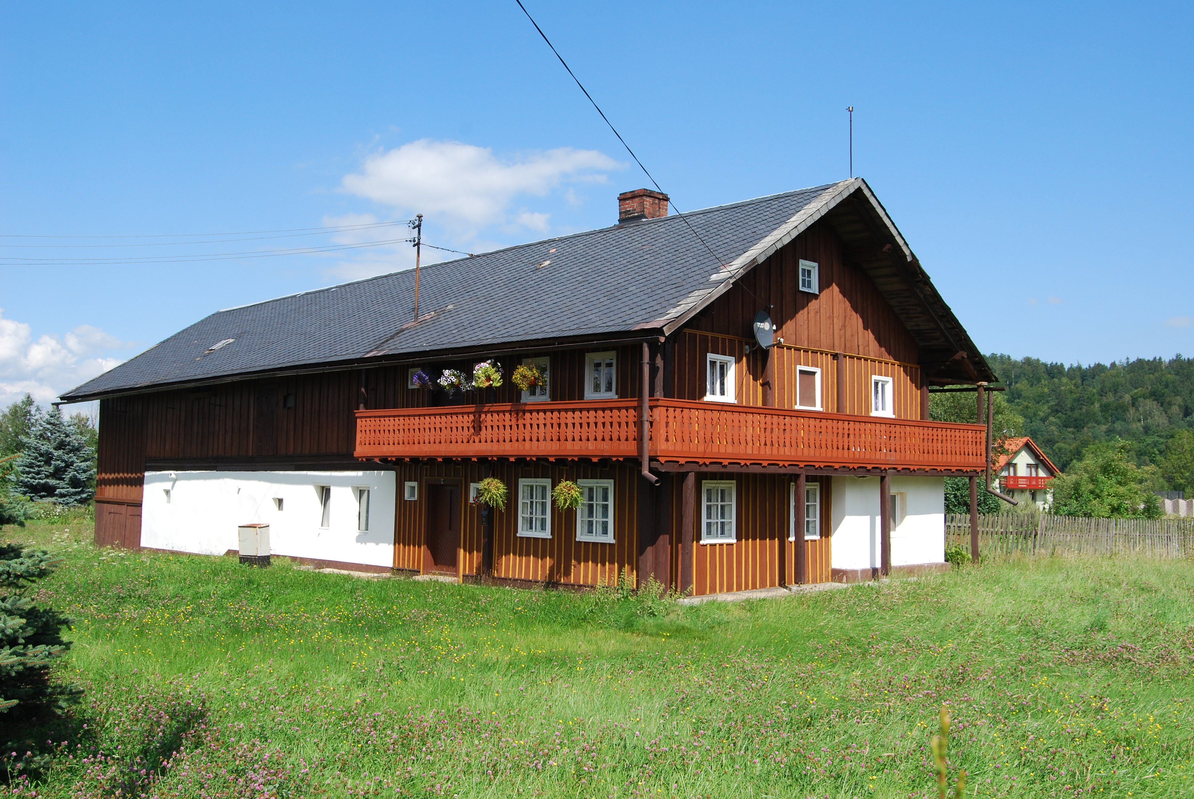 Mysłakowice, ul. Daszyńskiego 7 - budynek mieszkalno-gospodarczy